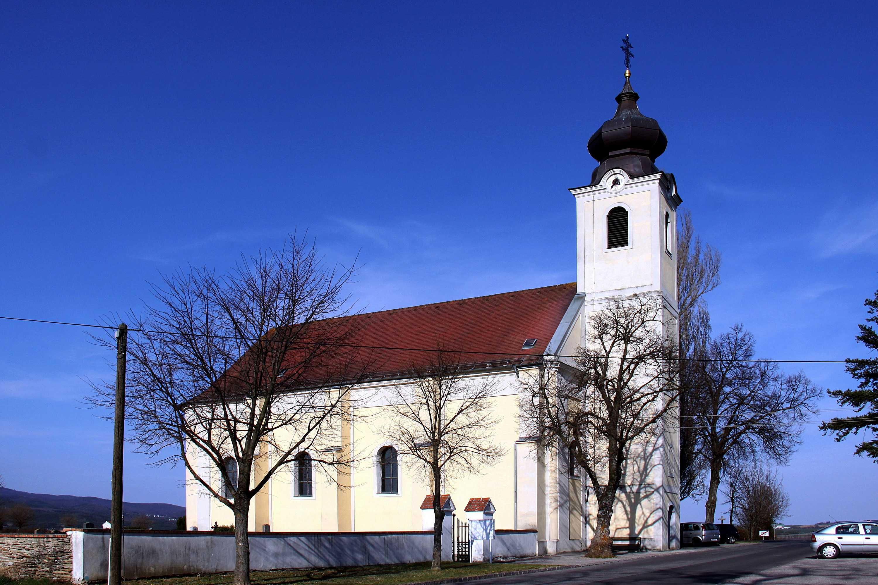 Markt Neuhodis - Pfarr- und Wallfahrtskirche Mariä Himmelfahrt in Dürnbach Object location47° 16′ 08.57″ N, 16° 23′ 30.31″ E